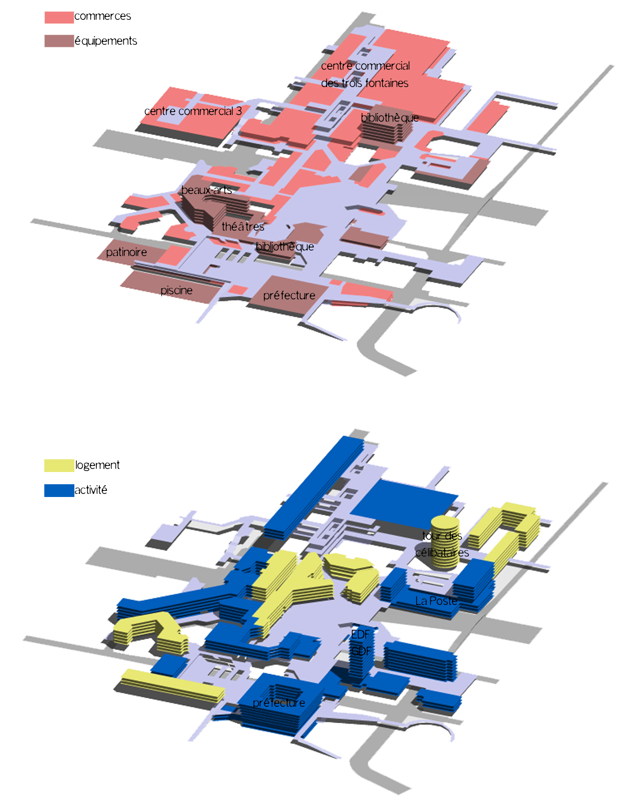 axonométries de la dalle de Cergy-Préfecture